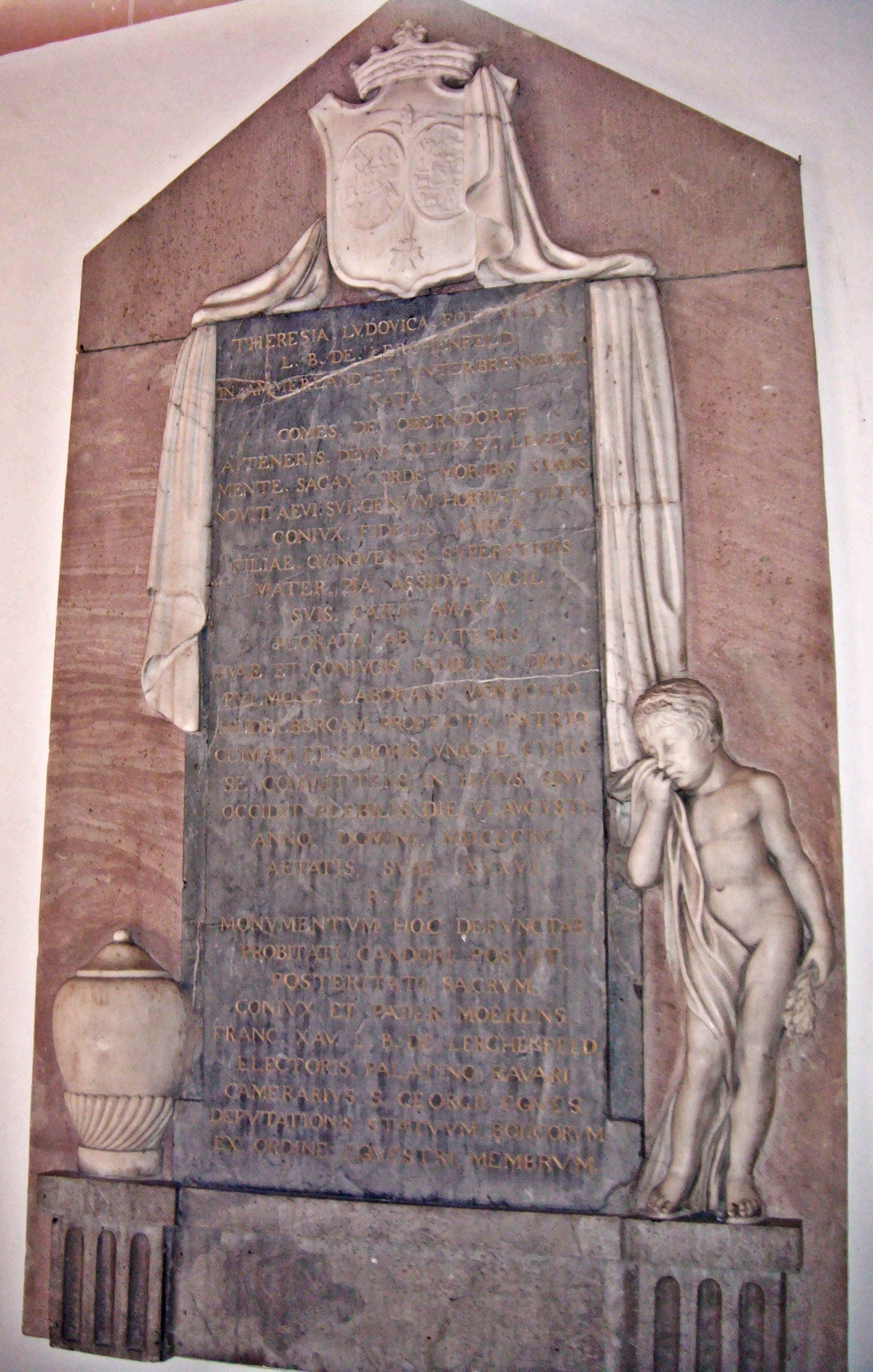 Heiliggeistkirche Heidelberg: Epitaph der Freifrau Maria Louisa Theresia Fortunata von Oberndorff (1767-1804), verheiratet mit Franz Xaver Freiherr von Lerchenfeld (1758-1832). Sie war die Nichte des kurpfälzischen Ministers und Statthalters Franz Albert Leopold von Oberndorff (1720-1799)